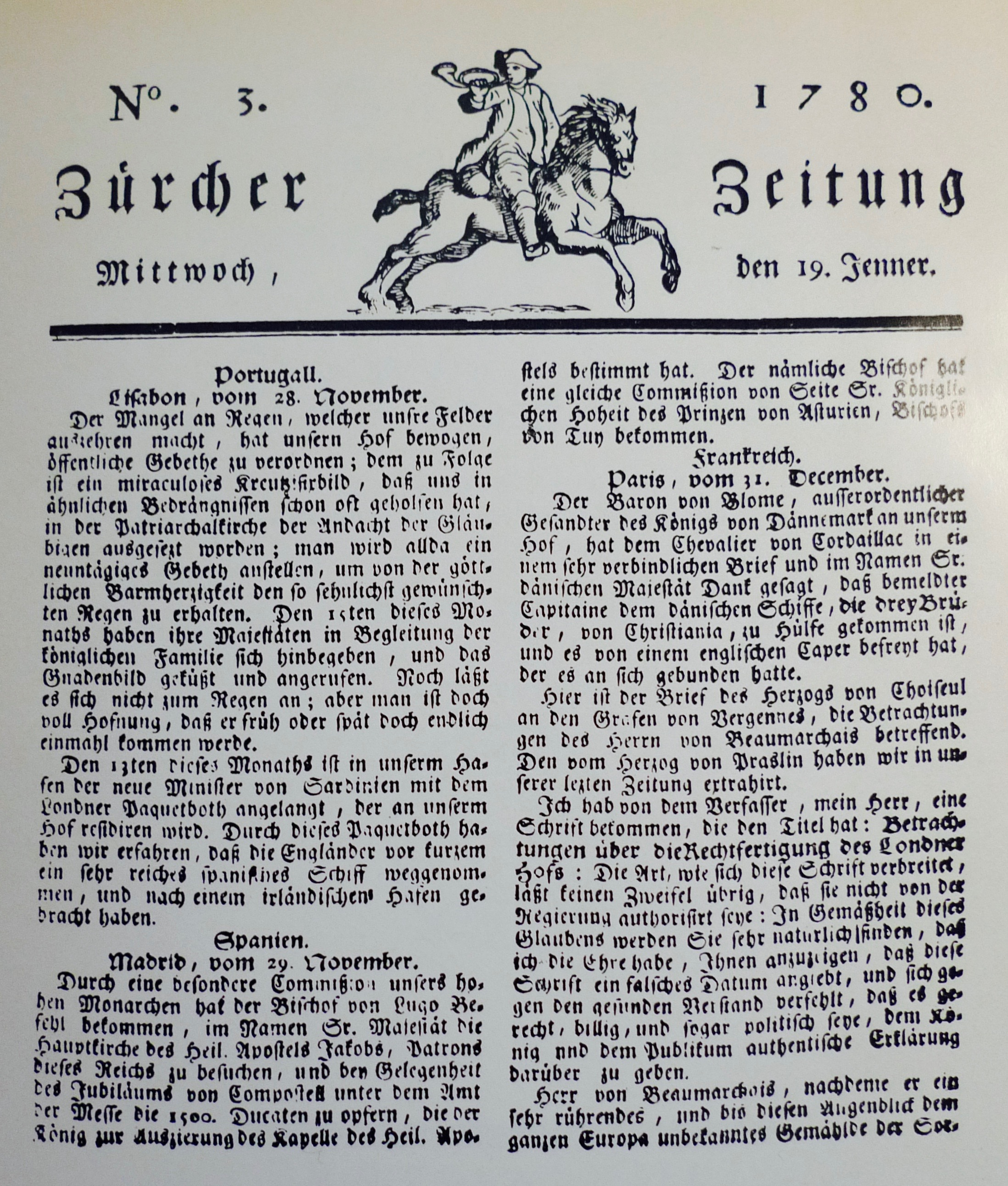 Erste von Johann Kaspar Riesbeck redigierte Nummer der Zürcher Zeitung. (Die Nummern 1 und 2 waren von Verleger Salomon Gessner redigiert worden.) Aus Rudolf Schäfer: Johann Kaspar Riesbeck. 2. Aufl., Frankfurt am Main-Höchst 1971, neben S. 27.